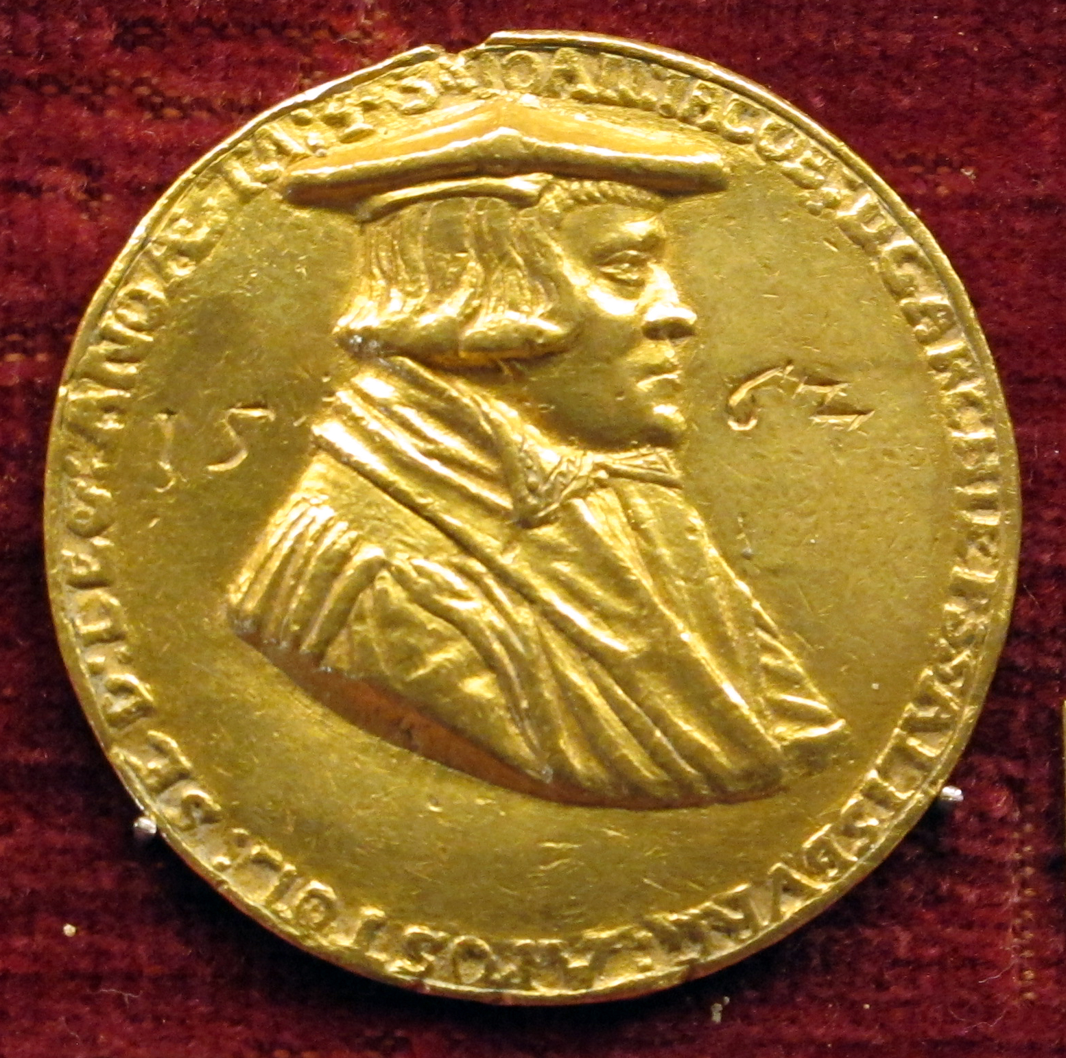 medaglia tedesca: Hans Aesslinger, med. di Giovanni Jacopo Khuen, arcivescovo di salisburgo, 1562